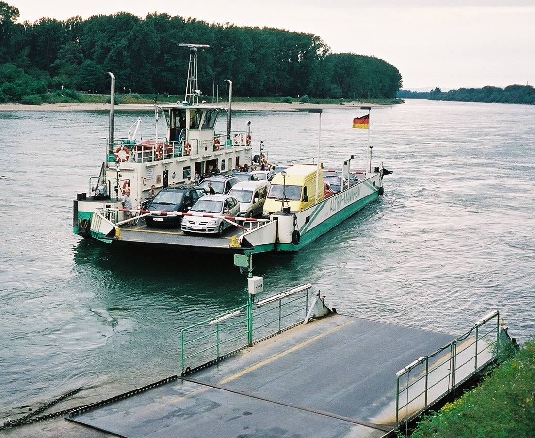 Die Rheinfähre zwischen Mannheim und Altrip im August 2004